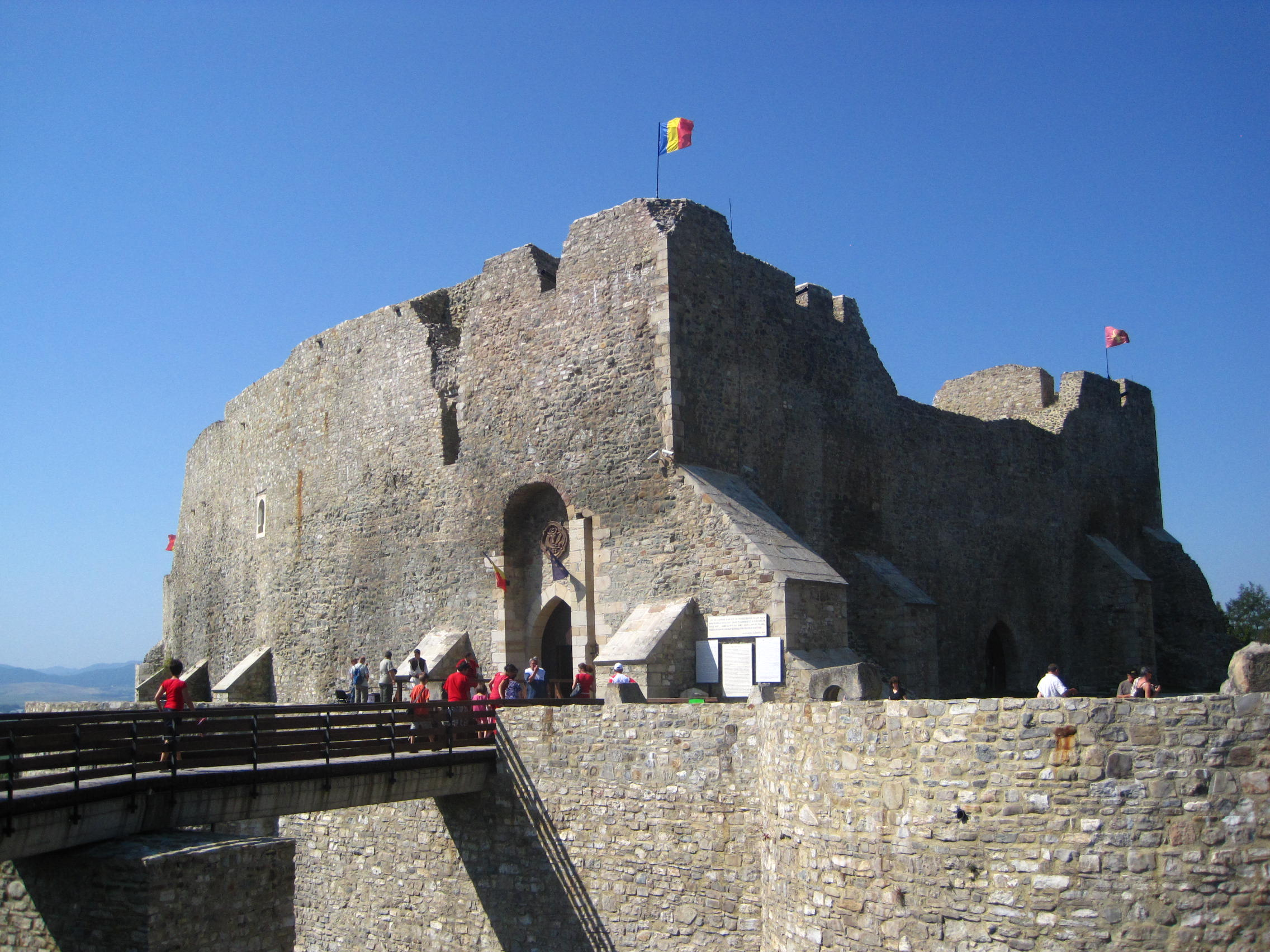 Château du NeamtRomână: Cetatea Neamțului